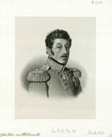 Johan Peter Fürchtegott Wildenradt (1769-1845), Danish general